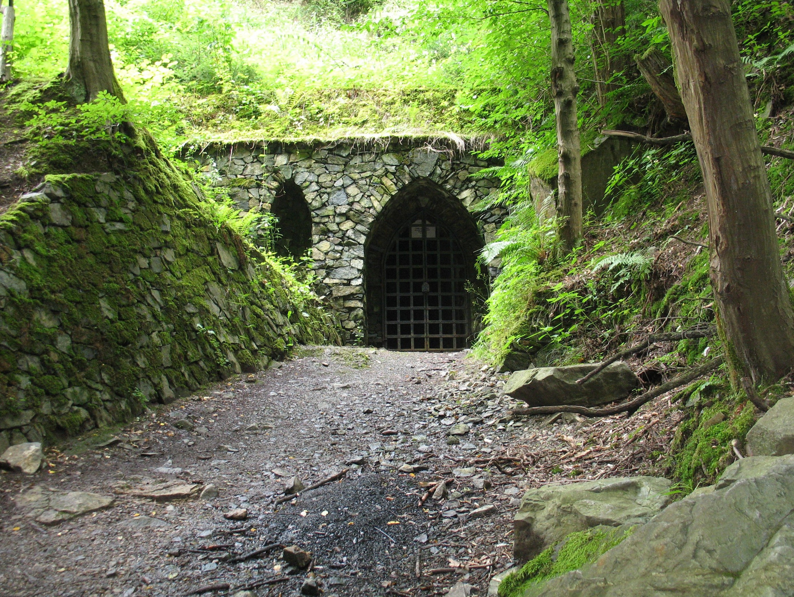 Prostor před vstupem